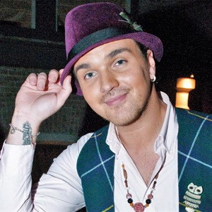 Александр Панайотов на презентации клипа Влада Топалова и Натальи Фироновой "Сочи 2014"